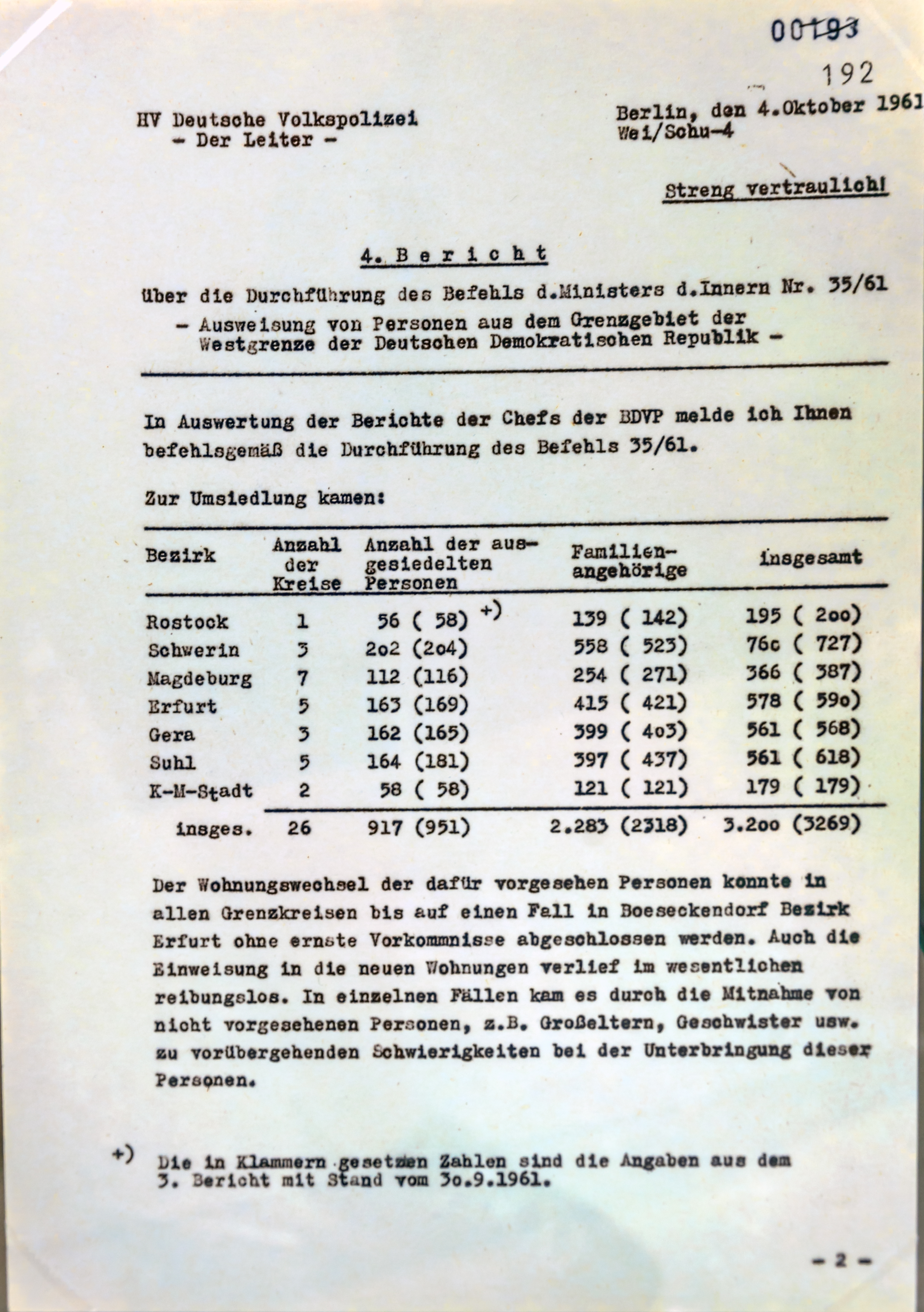 Rapport vom Leiter der Deutschen Volkspolizei über die Ausführung des Befehls Nr. 35/61 vom Minister des Inneren der DDR zur Zwangsumsiedlung von Personen aus dem Grenzgebiet zur Bundesrepublik Deutschland im Rahmen der Aktion Festigung